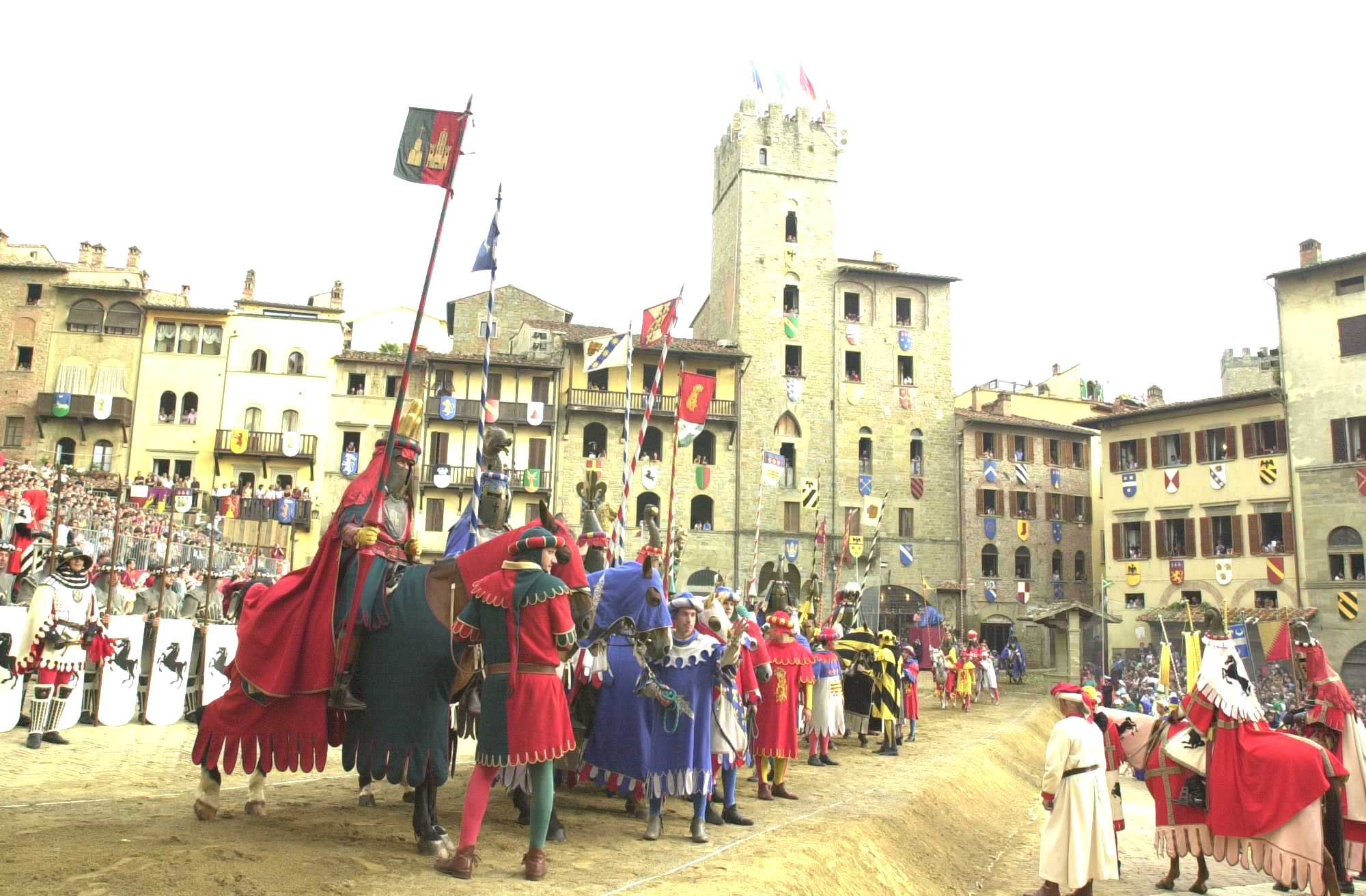 Nobili cavalieri di casata schierati sulla Lizza durante il corteo storico. I costumi degli oltre 300 figuranti che prendono parte al corteggio della Giostra del Saracino rievocano il passato medievale della città di Arezzo.